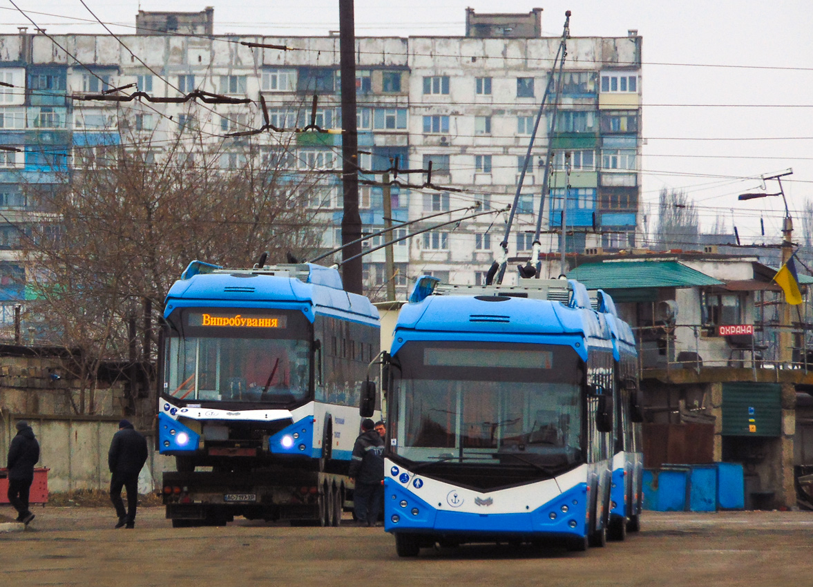 Разгрузка нового троллейбуса на территории депо. Ещё два новых троллейбуса стоят рядом.